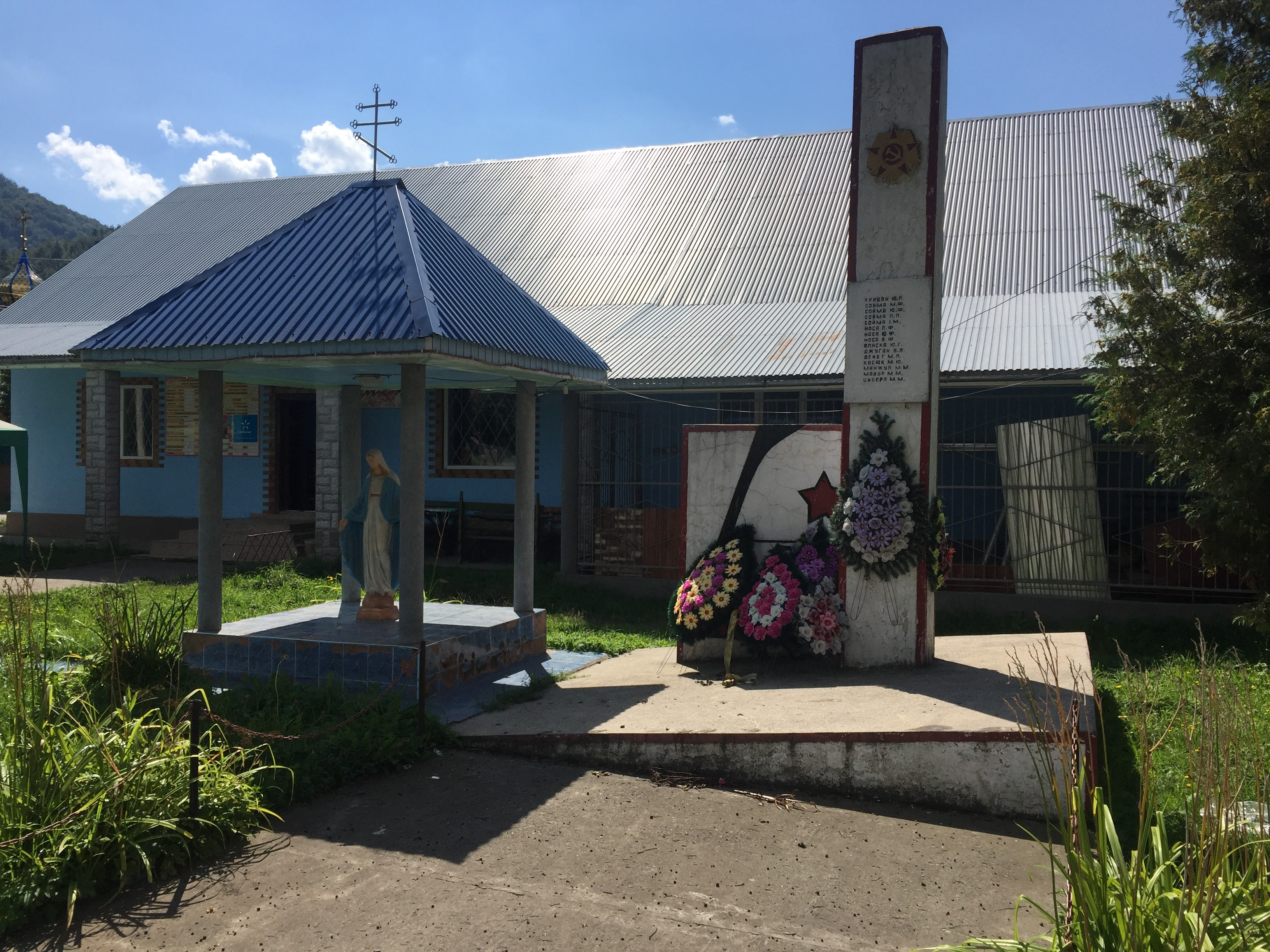 Краснянська сільська рада та обеліск полеглим воїнам під час Другої світової війни